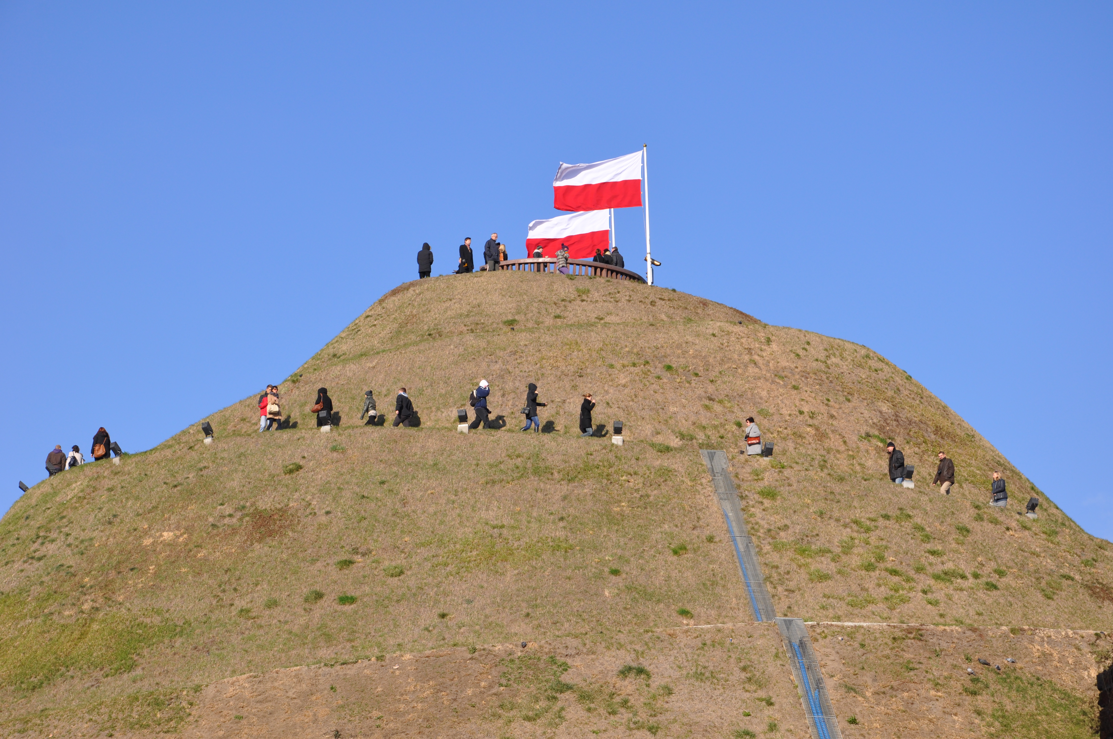 Kopiec Kościuszki Kraków, al. Waszyngtona (zabytek nr A-954)